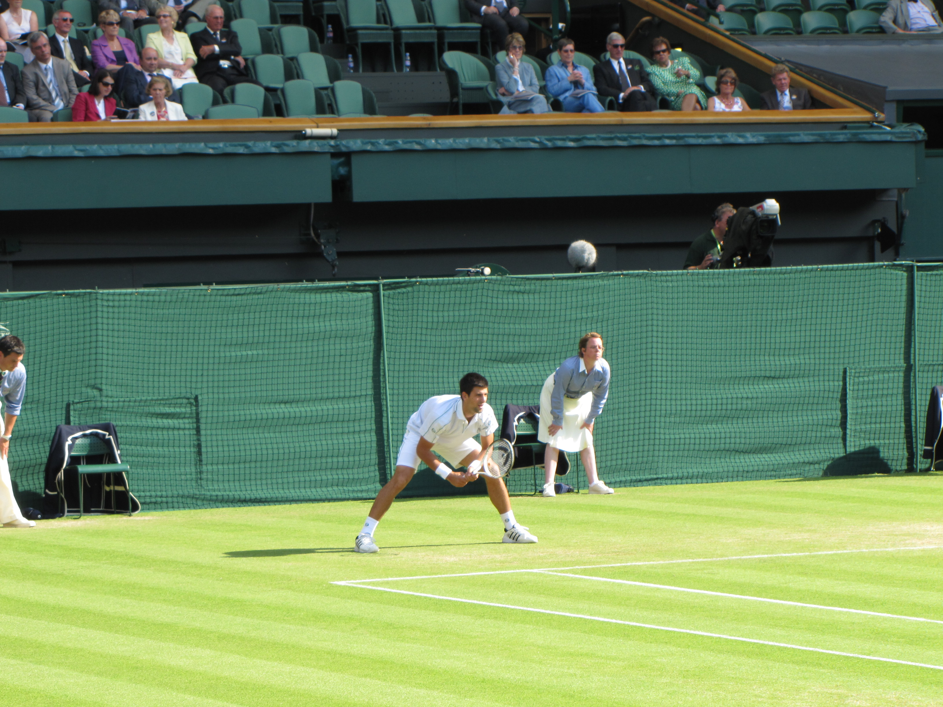 Novak Đoković, 2010 Wimbledon Championships